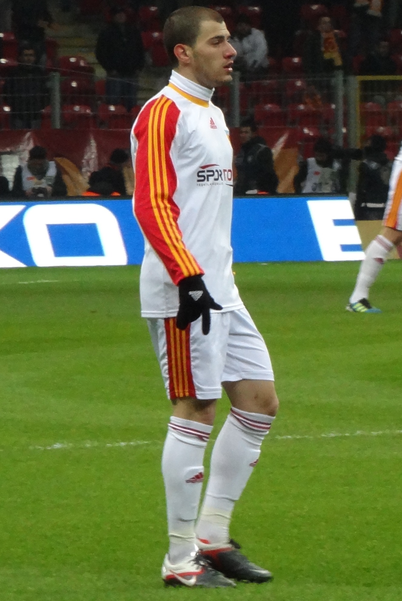 James Troisi Galatasaray deplasmanında